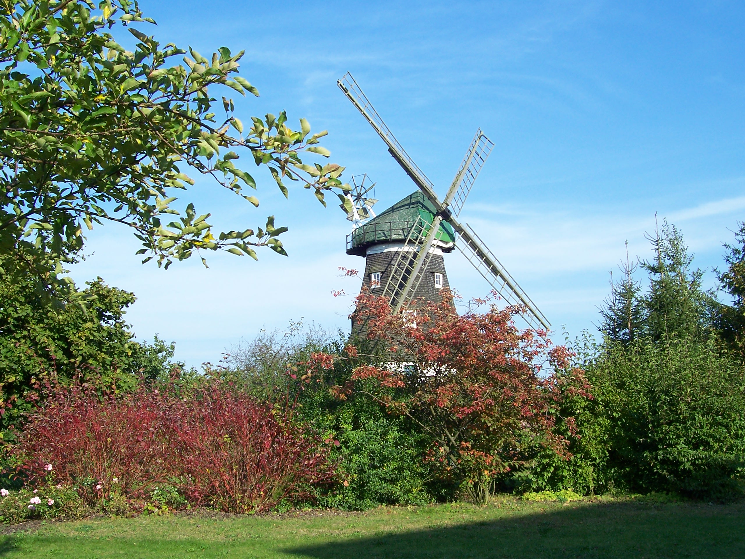 Holländermühle Grevesmühlen